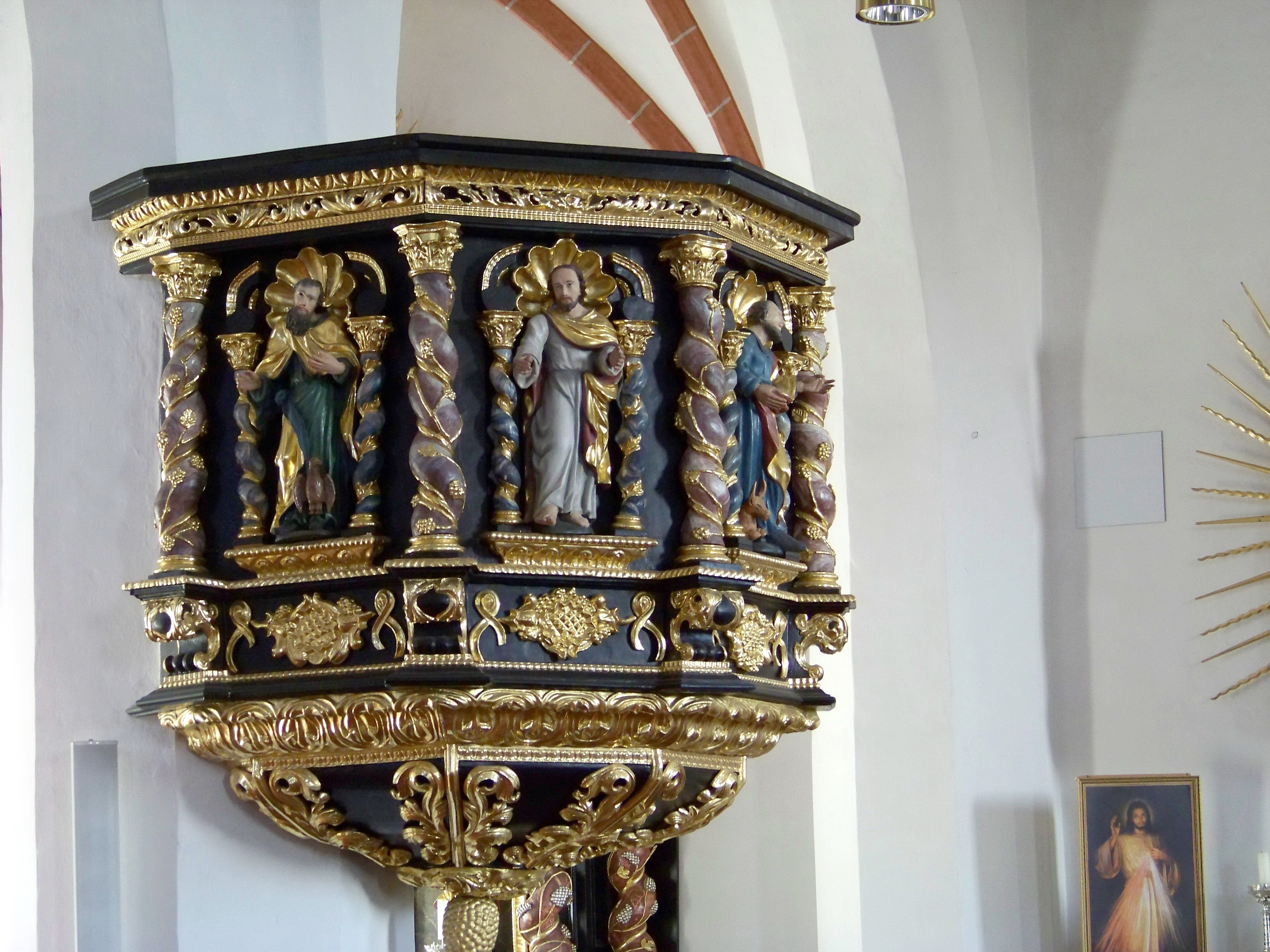 Obersüßbach, Kirchgasse 7, Katholische Pfarrkirche St. Jakobus der Ältere. im Kern romanische Chorturmanlage, spätgotisch verändert, 1877/80 neugotisch erweitert durch Verlängerung nach Westen und Anbau der Seitenschiffe. Barocke Kanzel mit gewundenen Ecksäulchen und Band- und Rankwerk. In den Feldern kleine Figuren der vier Evangelisten.